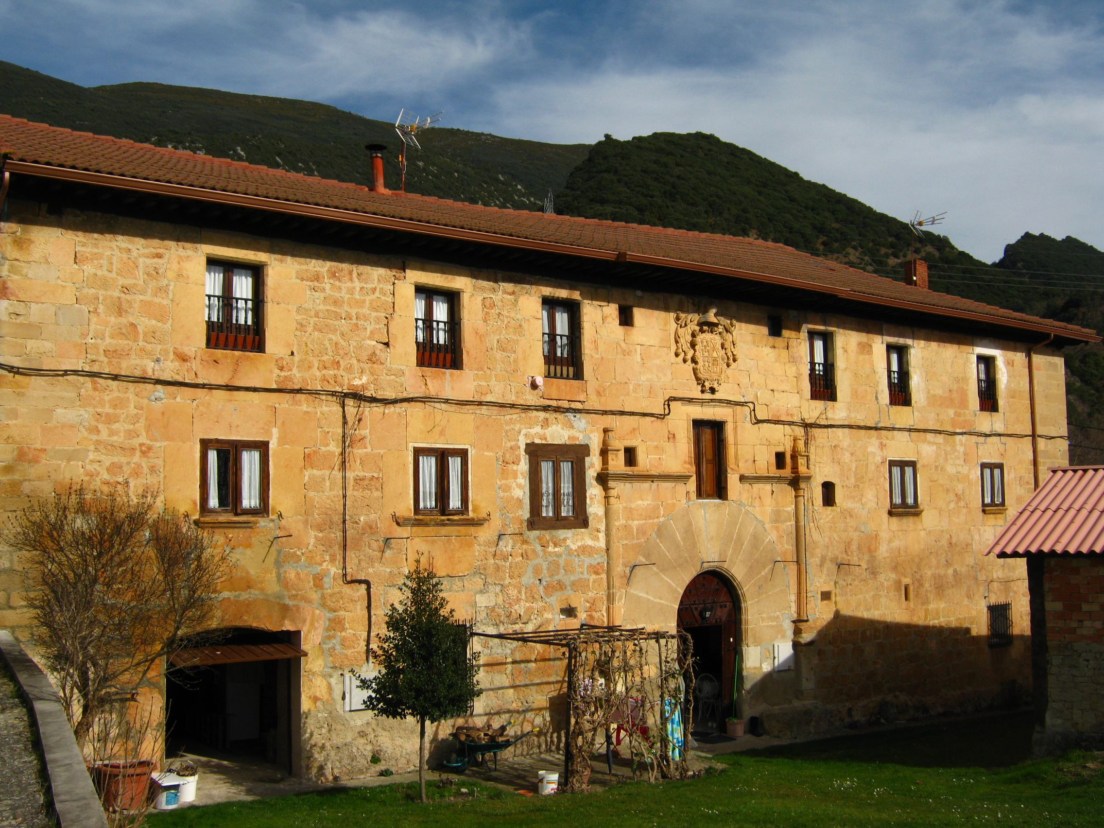 Casa blasonada en Herrán, en el valle de Tobalina (Burgos, Castilla la Vieja) Pertenecía a Dictino Armesto y Vinuesa